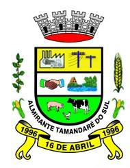 Brasão oficial de Almirante Tamandaré do Sul - RS, Brasil.